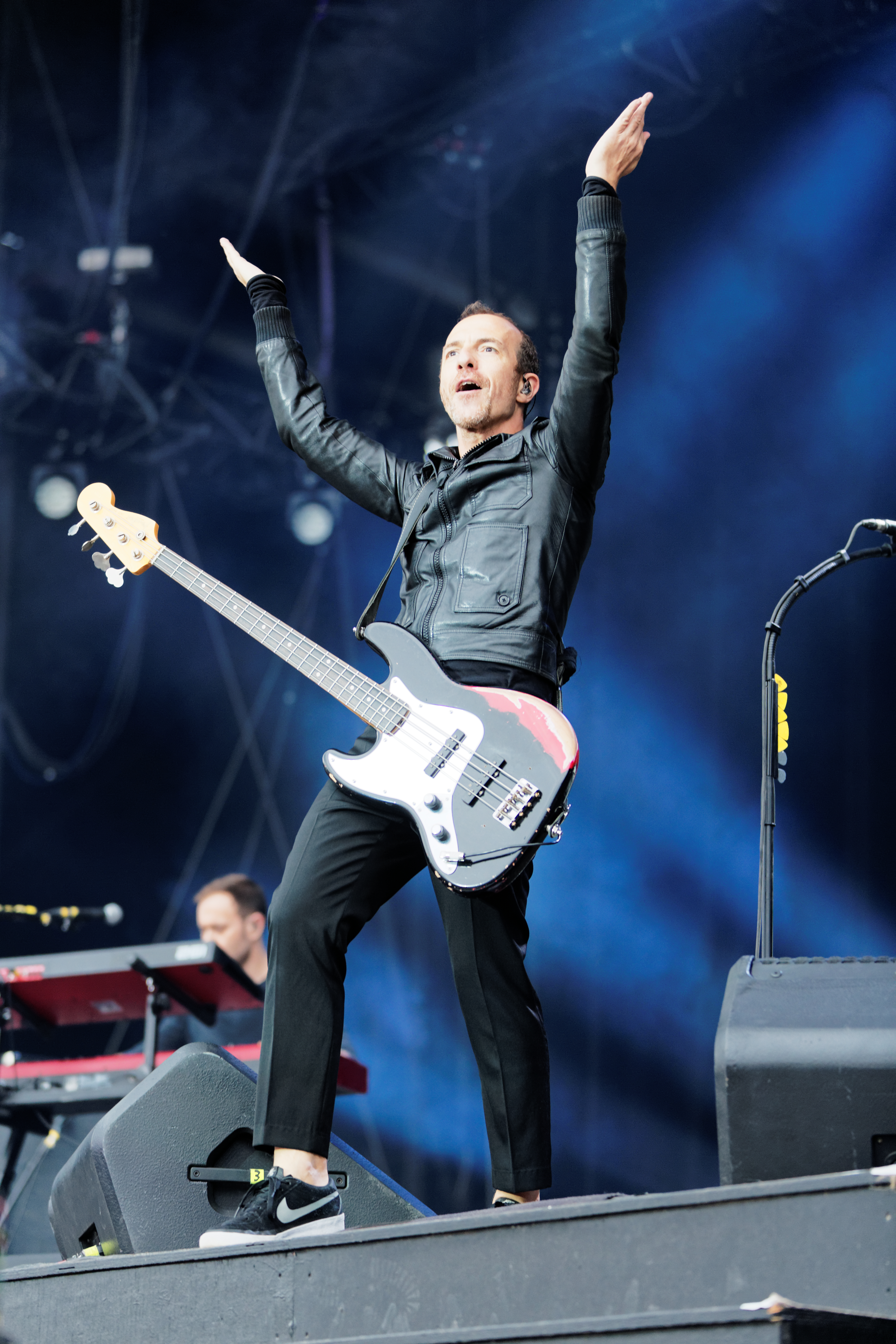 Le festival des vieilles charrues 2015.